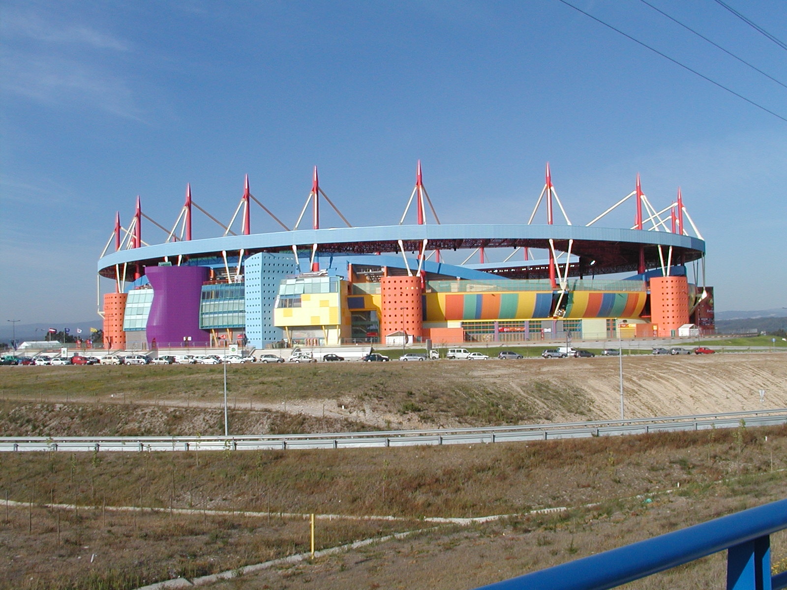 foto StaraBlazkova 2004